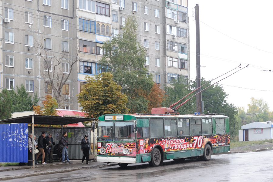 ZiU-9 030 in Krasnodon